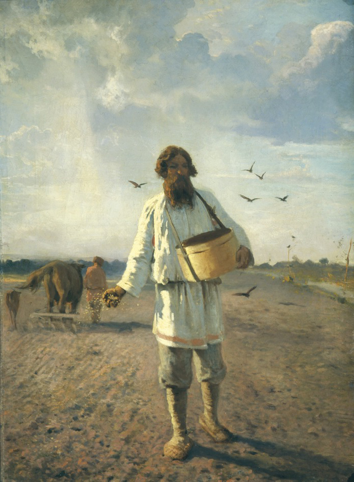 Г. Мясоедов. «Сеятель», 1888. Центральный музей современной истории (Москва)